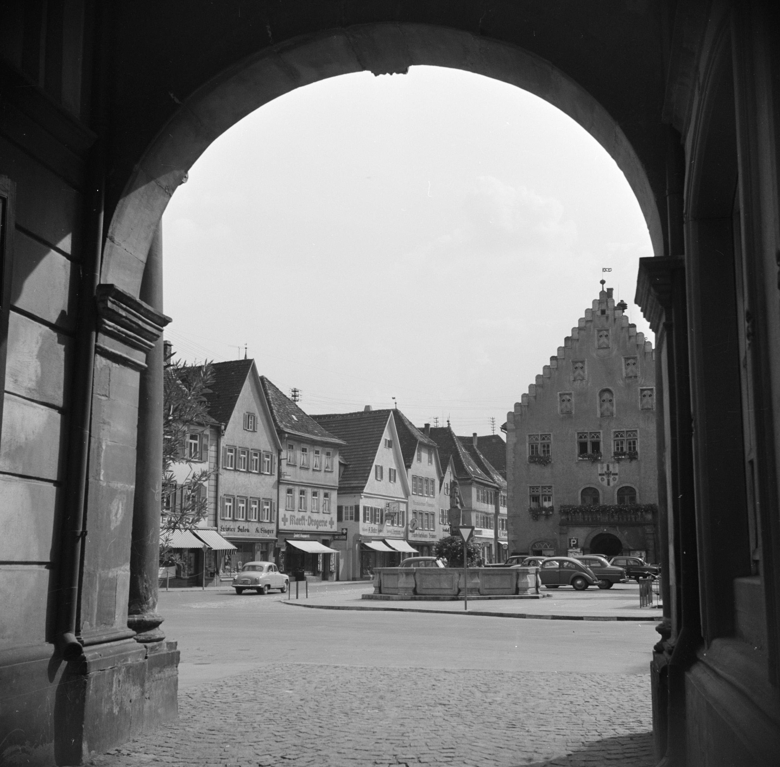 Collectie / Archief : Fotocollectie Van de Poll Reportage / Serie : Hohenloher Land Beschrijving : Doorkijkje naar het marktplein met het standbeeld van Wolfgang Schutzbar en de Milchlingsbrunnen Datum : september 1953 Locatie : Bad Mergentheim, Baden-Württemberg, Duitsland, West-Duitsland Trefwoorden : fonteinen, poorten, stadsbeelden, standbeelden Persoonsnaam : Schutzbar genannt Milchling, Wolfgang Fotograaf : Poll, Willem van de Auteursrechthebbende : Nationaal Archief Materiaalsoort : Negatief (6x6) Nummer archiefinventaris : bekijk toegang 2.24.14.02 Bestanddeelnummer : 254-3153